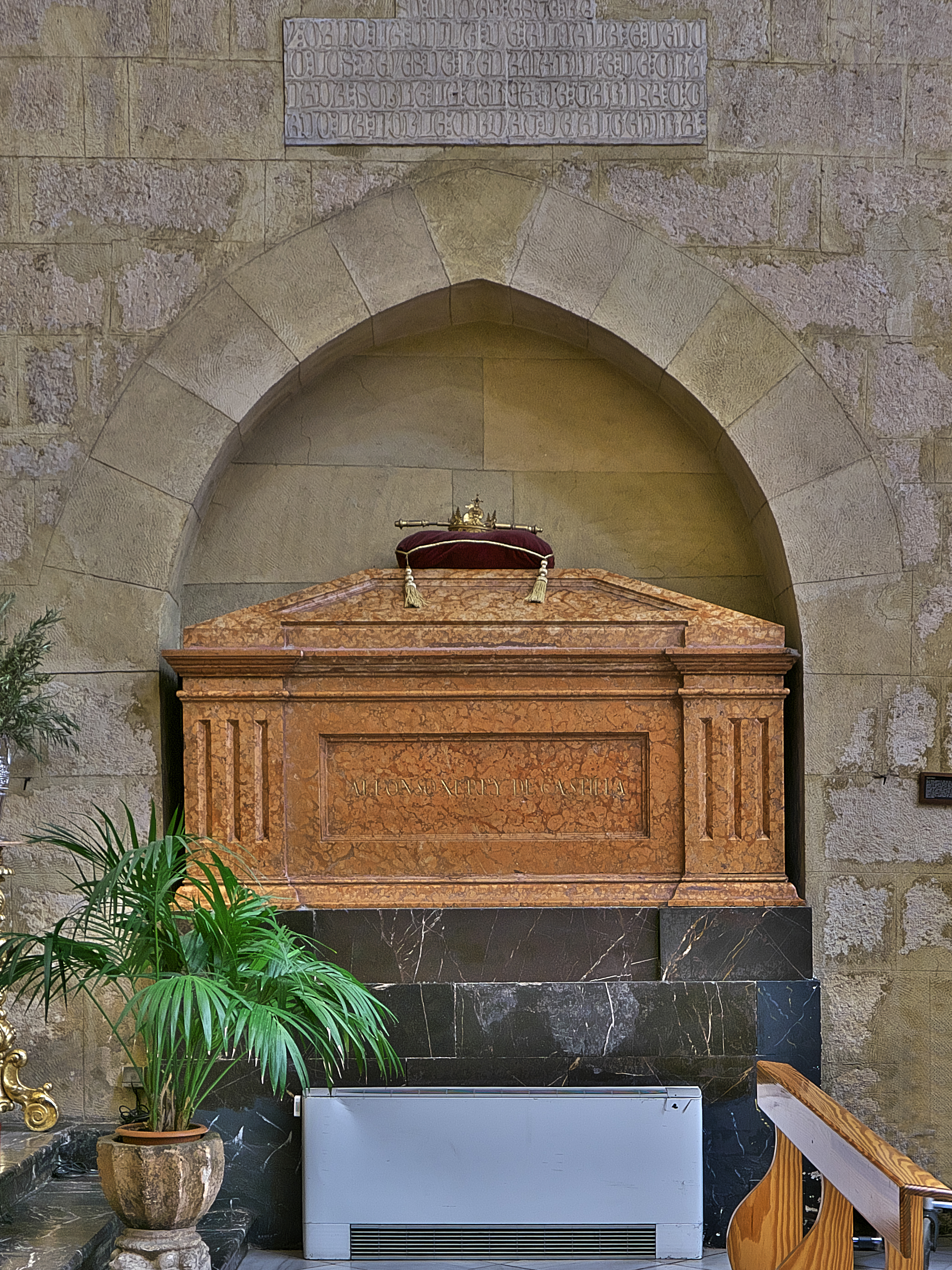 Real Colegiata de San Hipólito (Córdoba). Enrique II ordena trasladar el sepulcro (ca. 1371-1376) de su padre, Alfonso XI de Castilla, a ésta real colegiata, procedente de la Capilla Real de Córdoba.